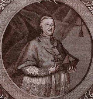 Csáky Miklós kalocsai, majd esztergomi érsek.